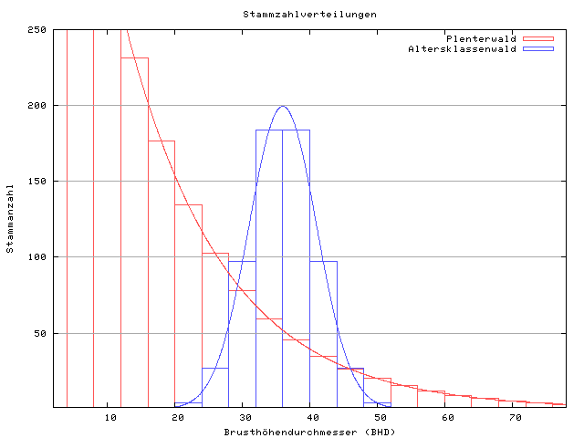 Darstellung hoffentlich nicht unmöglicher Kurven von Stammzahlen im Plenter- und Altersklassenwald ### gnuplot ### Kurven vielleicht möglicher Stammzahlen im Plenter- und ### Alterklassenwald. ### License: none. I don't care. set encoding iso_8859_1 #set terminal pbm color set terminal x11 set ylabel "Stammanzahl" set xlabel "Brusthöhendurchmesser (BHD)" set title "Stammzahlverteilungen" set yrange [1:250] #set logscale y set boxwidth 4 set grid set grid noxtics set grid y2tics set multiplot set samples 20 plot [2:78] sigma=0.2, xe=36, \ 600*exp(-0.068*x) t "Plenterwald" with boxes 1, \ 100 * 1/(sigma*sqrt(2*pi)) * exp(-1*(x-xe)**2 / 2*sigma**2) t "Altersklassenwald" with boxes 3 set samples 2000 plot [2:78] sigma=0.2, xe=36, \ 600*exp(-0.068*x) t "" with lines 1, \ 100 * 1/(sigma*sqrt(2*pi)) * exp(-1*(x-xe)**2 / 2*sigma**2) t "" with lines 3 unset multiplot